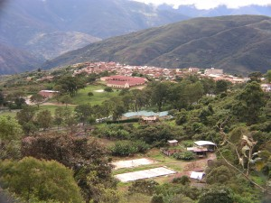 Bolivia